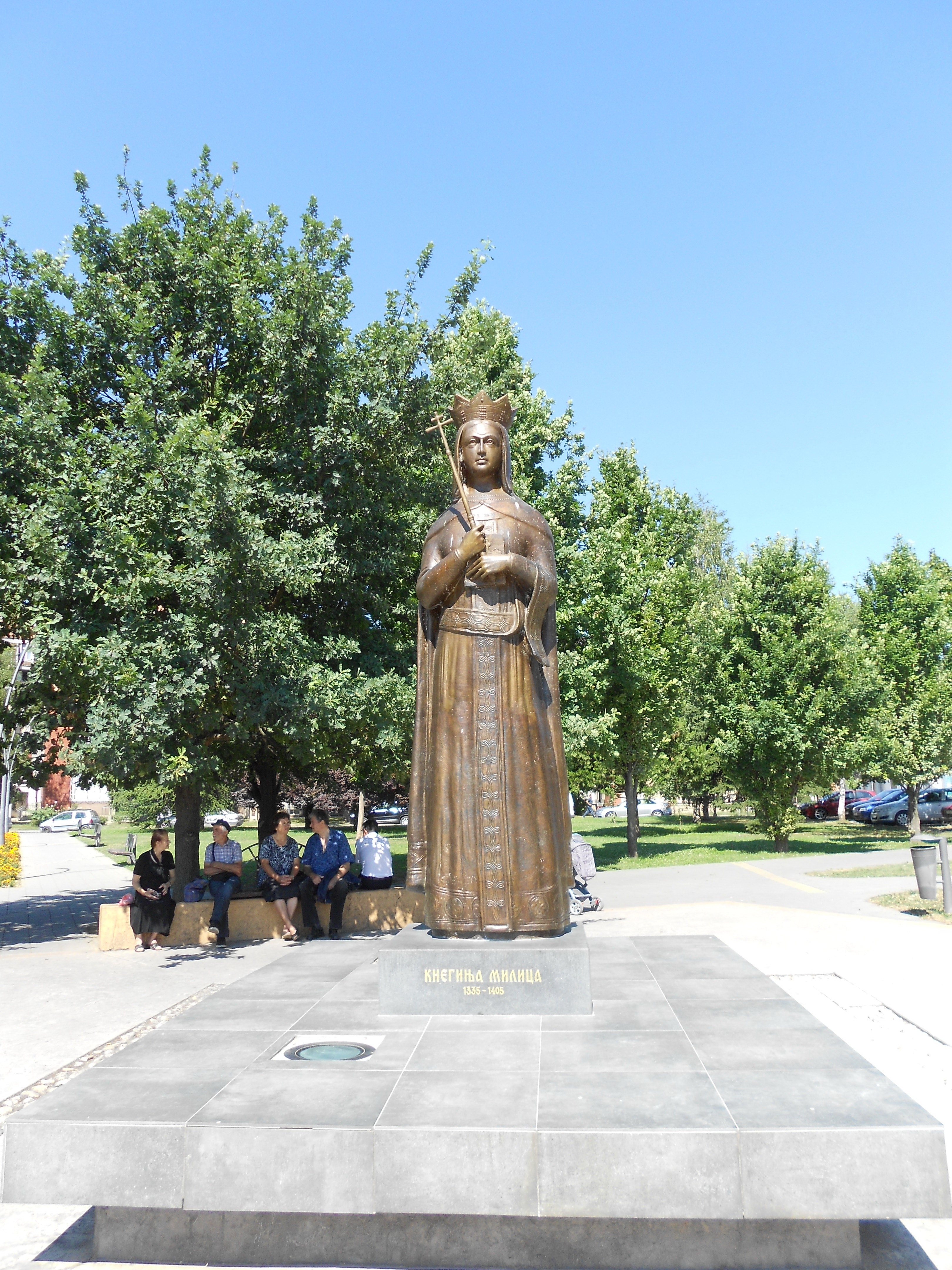 Spomenik kneginje Milice u Trsteniku.